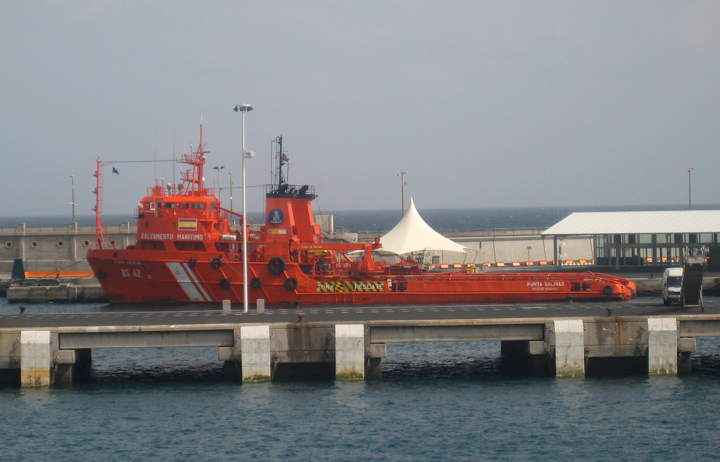 Buque "Punta Salinas" de la Sociedad de Salvamento y Seguridad Marítima IMO Number: 7931894 MMSI Number: 224522000 Callsign: EABF Length: 62 m Beam: 13 m